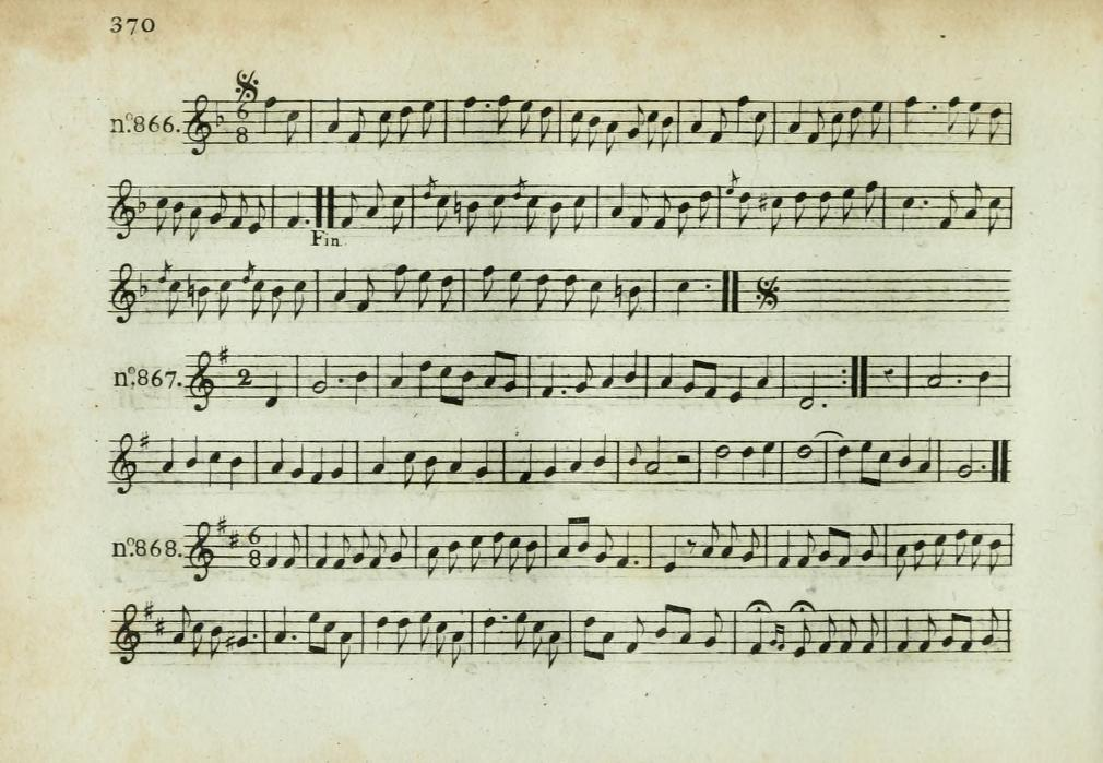 Page du recueil de timbres La clé du Caveau, le n°866 est l'air de Bon voyage Monsieur Dumollet, qui sert d'air du Carnaval à Dunkerque.